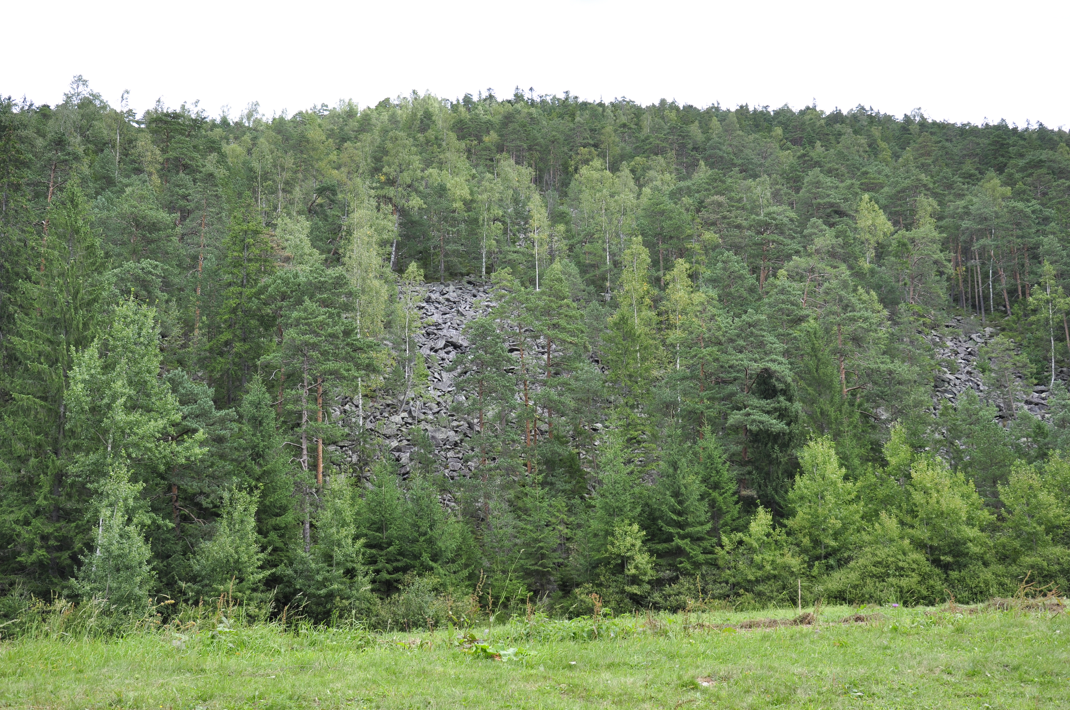 Реліктові сосни